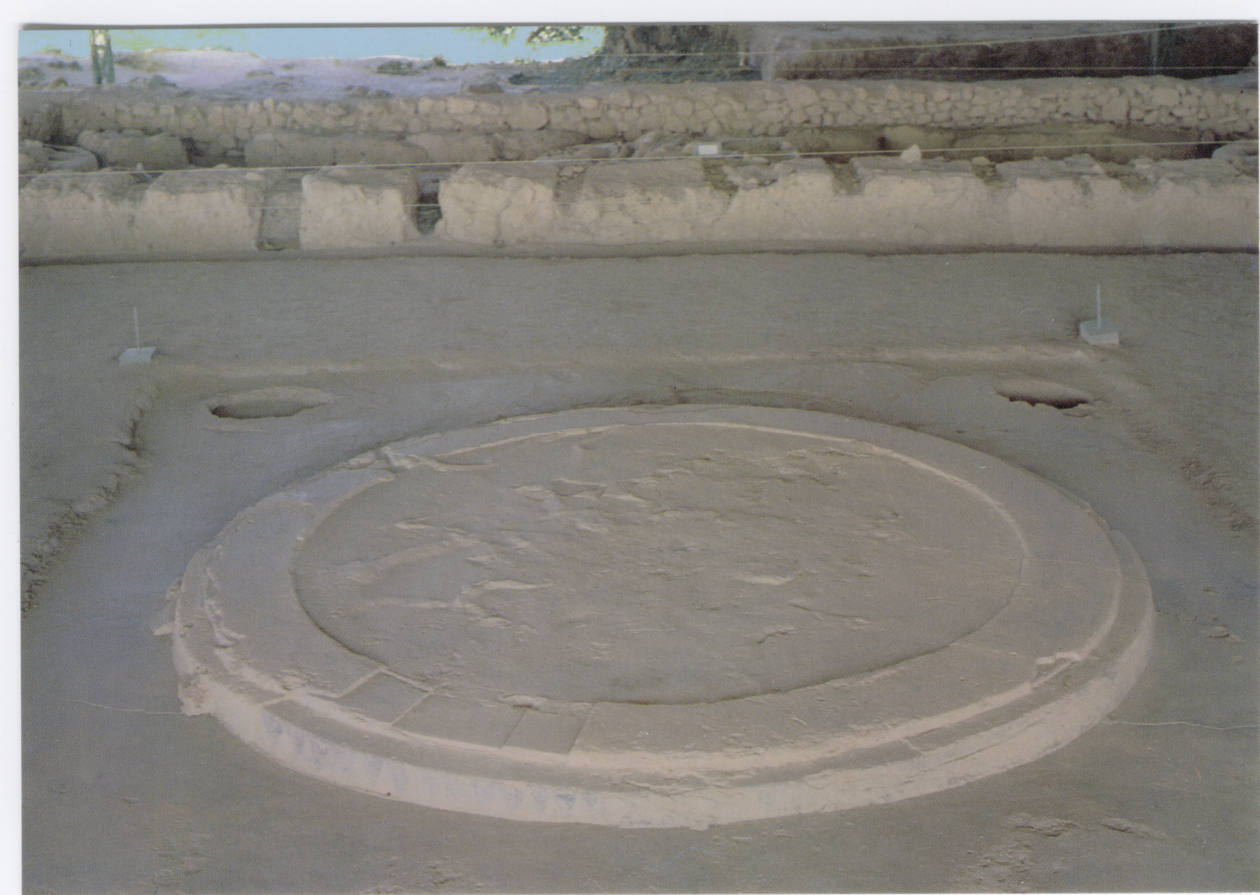 Pilo di Messenia - Palazzo di Nestore - Sala del trono